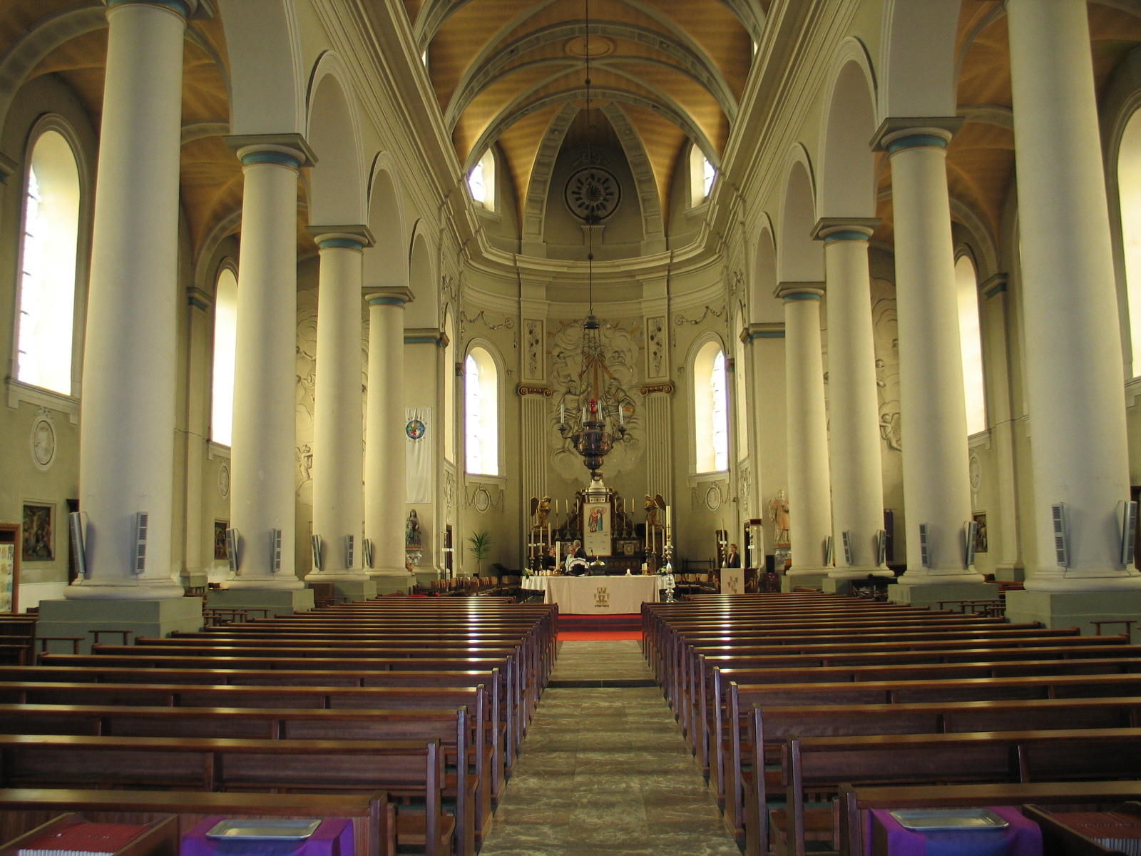 Interieur van de kerk van Zonhoven - eigen foto